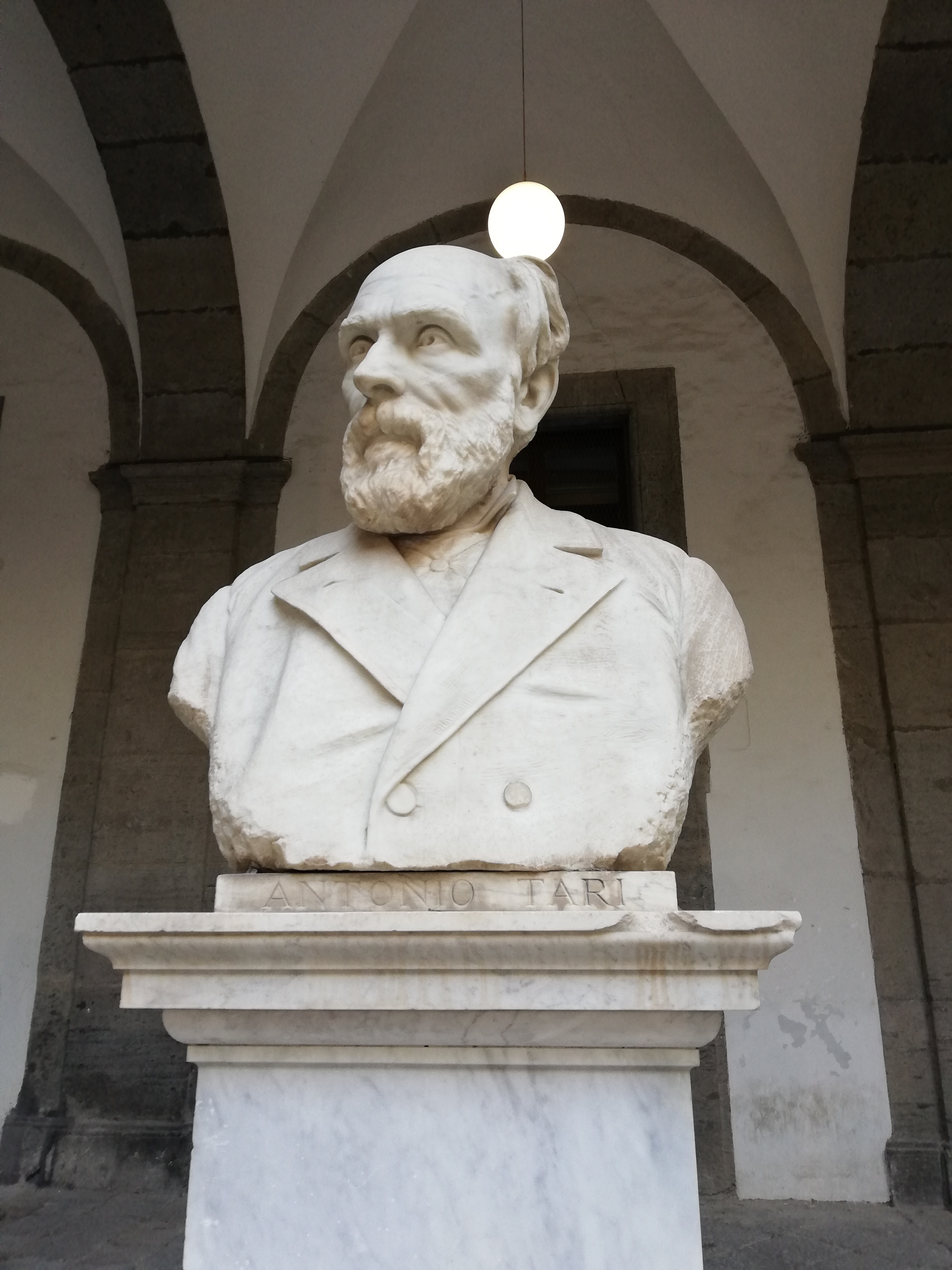 Busto di Antonio Tari nel Cortile delle Statue di Napoli